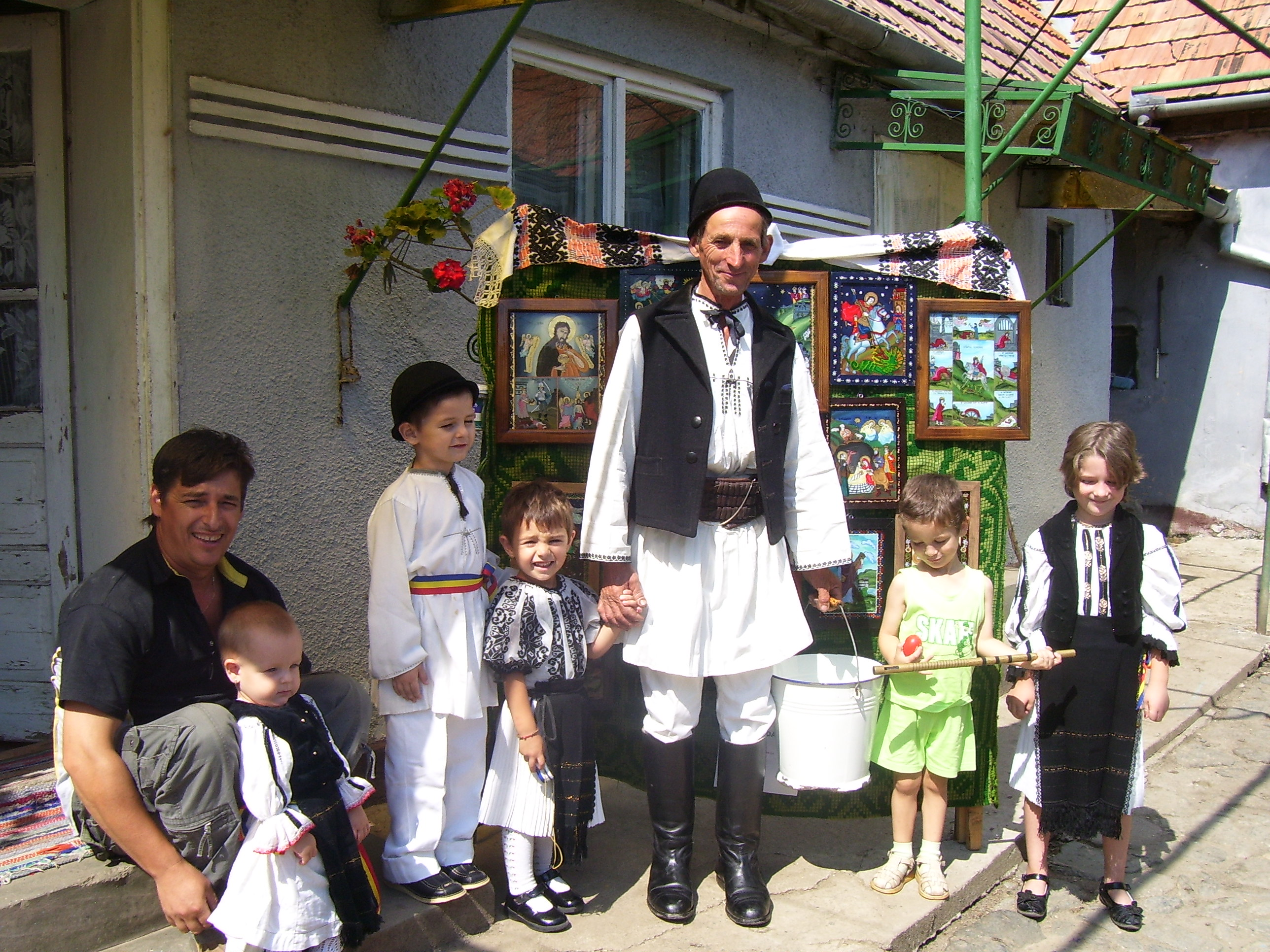 la dostat